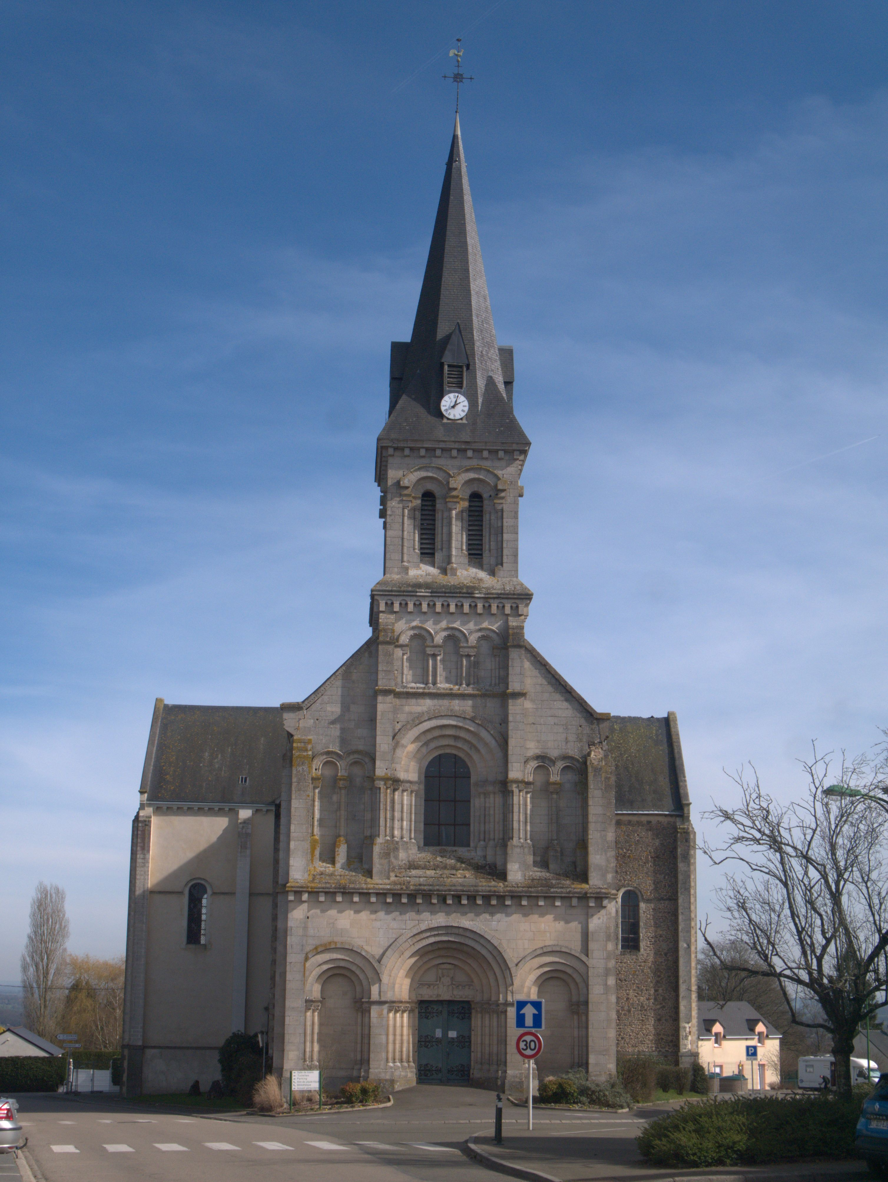 La Baconnière église superbe vue !